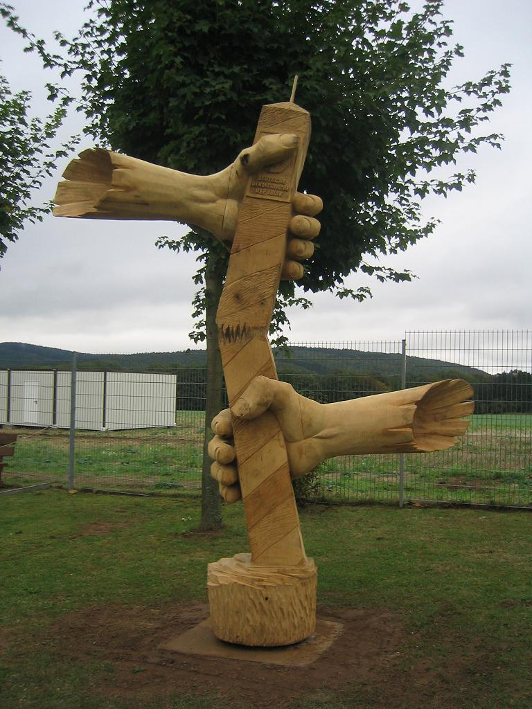 Zerbrochener Pfahl